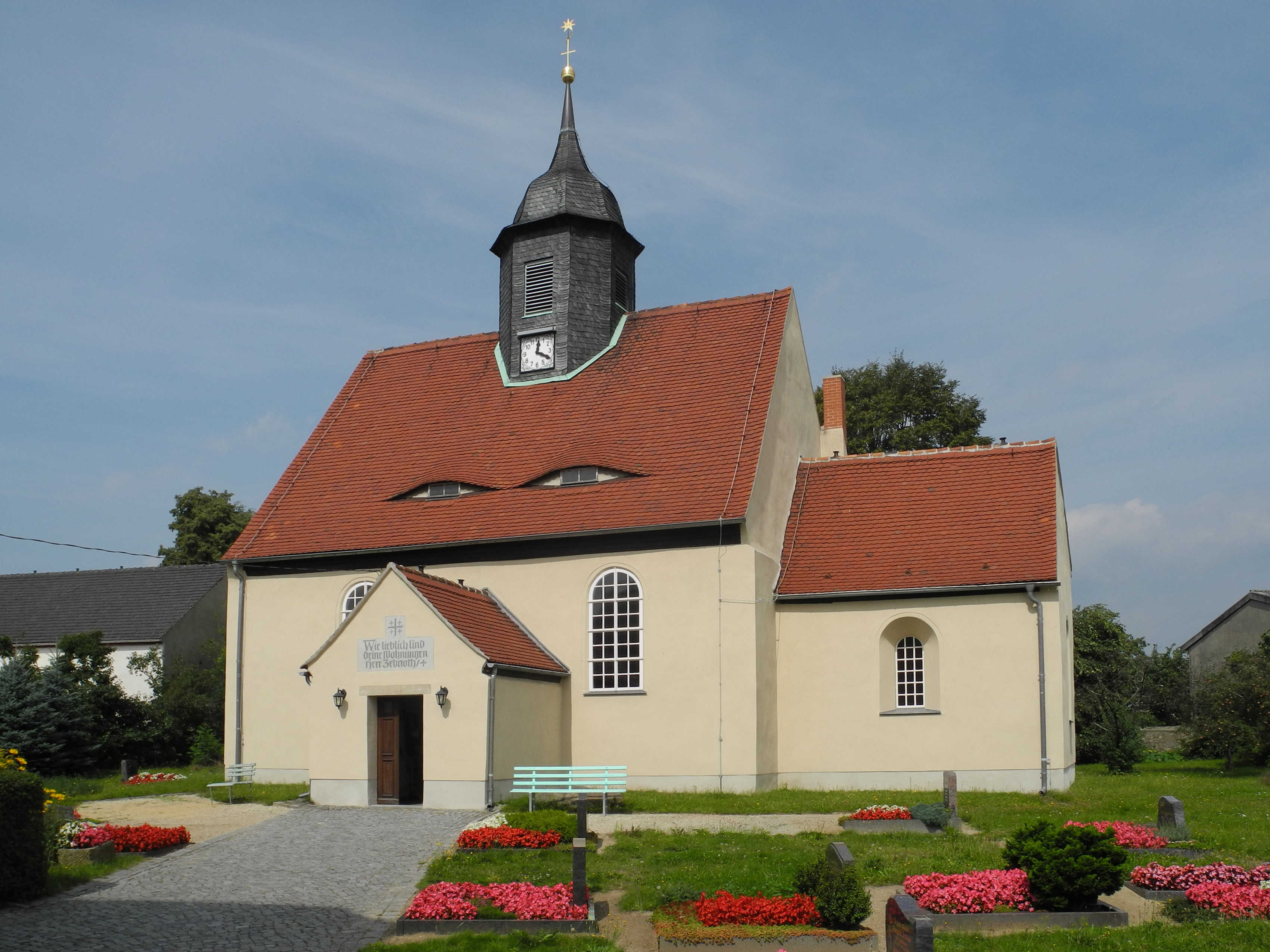 Dorfkirche in Schönborn (OT von Dresden), Seiffersdorfer Str. 5